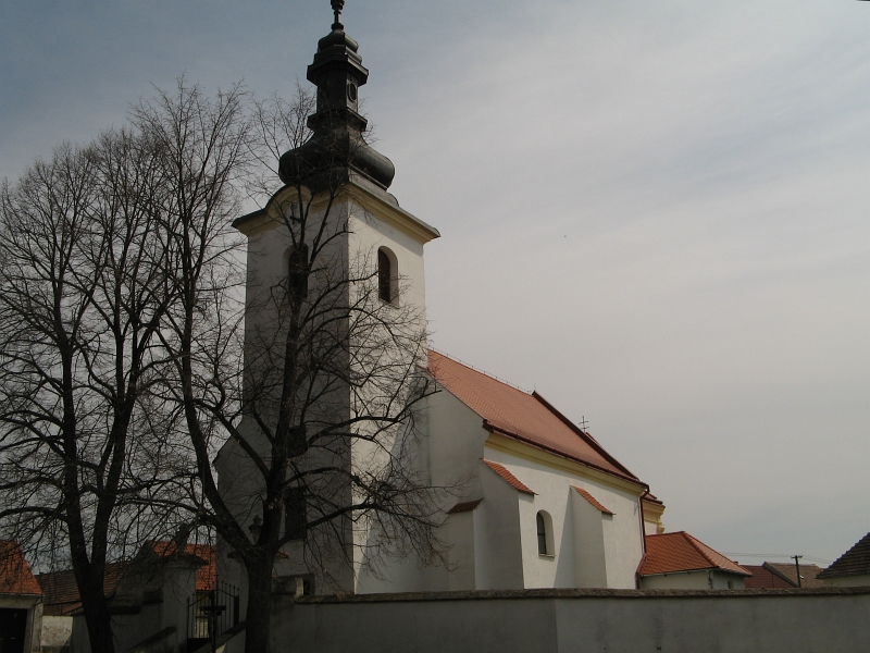 Kostel sv. Jakuba Většího (Želetice), Želetice